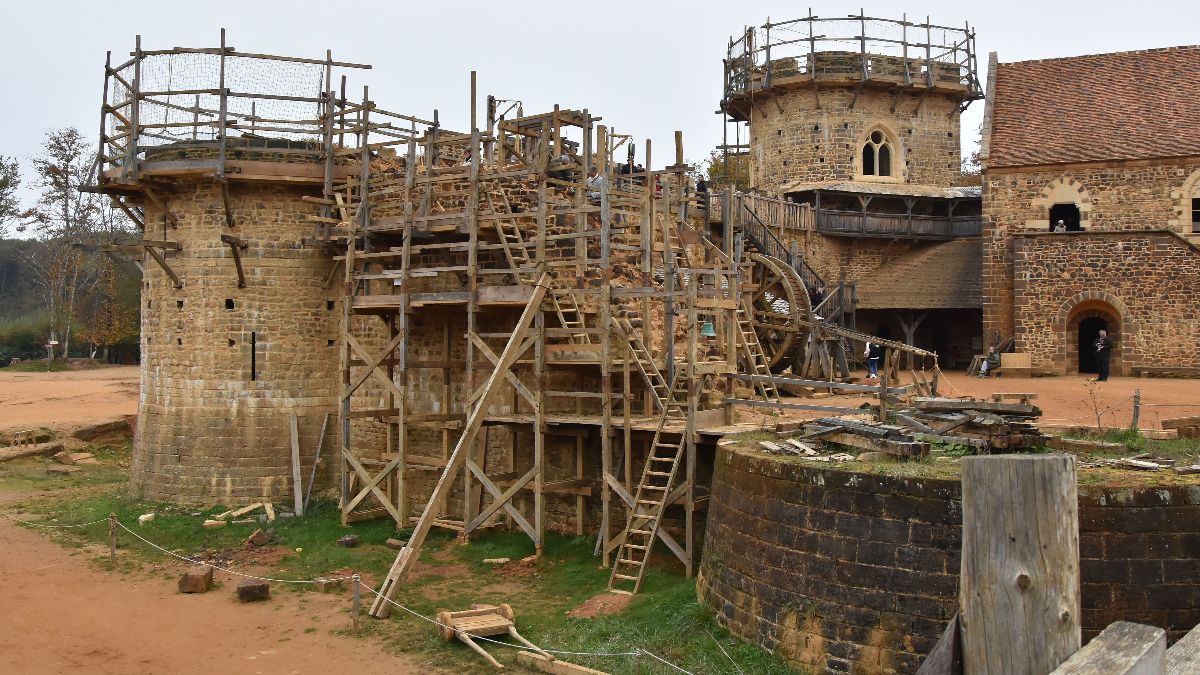 Het kasteel van Guédelon vanaf de loopbrug met vooraan rechts een toren in aanbouw van het poortgebouw, achteraan links de kapeltoren en rechts de trap naar het huis van de leenheer